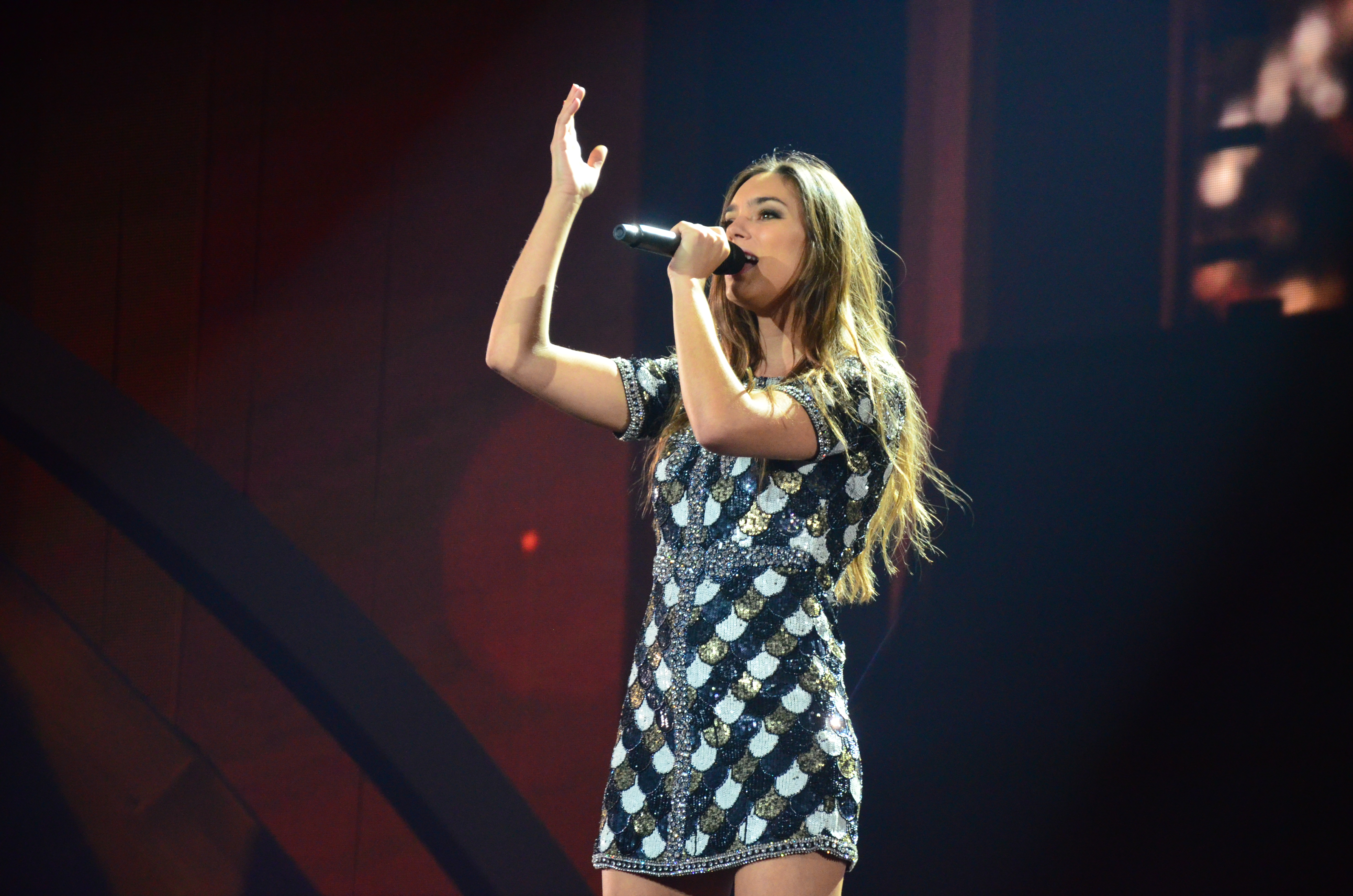 10 травня 2017 року у Києві відбулась генеральна репетиція 2 півфіналу "Євробачення".